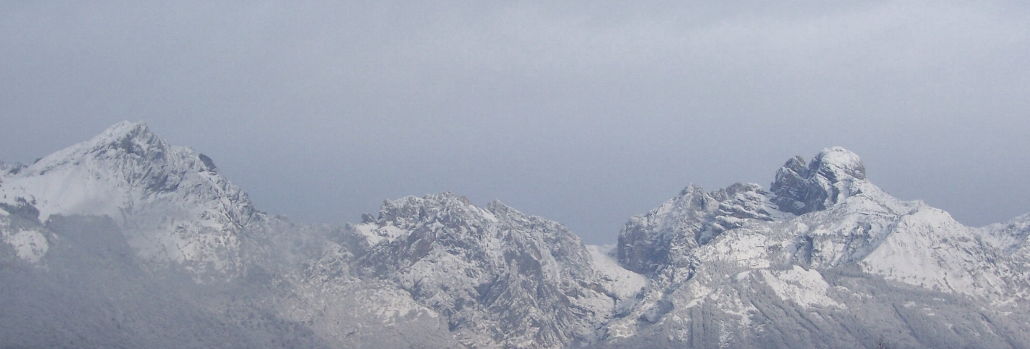 Dolomiti bellunesi. Il gruppo del Pizzocco